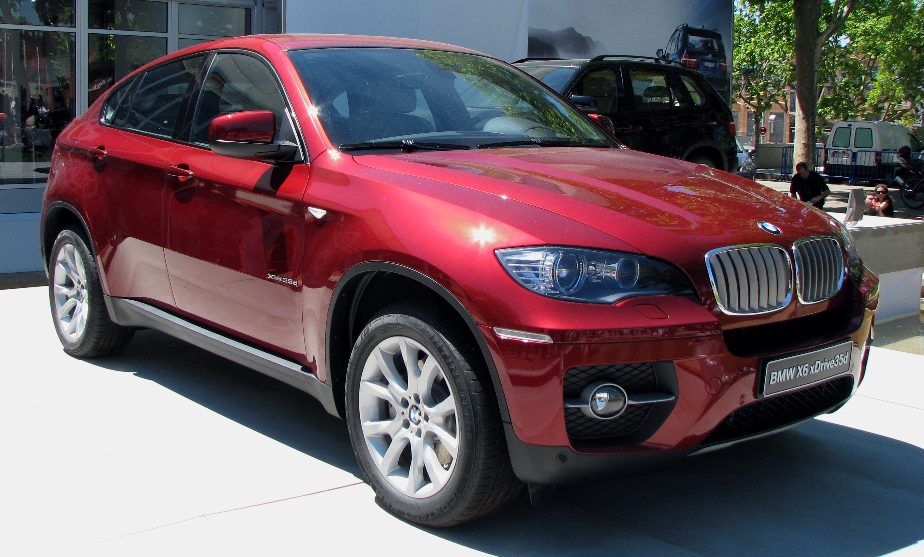 BMW X6 xDrive 3.5d en el Salón Internacional del Automóvil de Barcelona 2009.